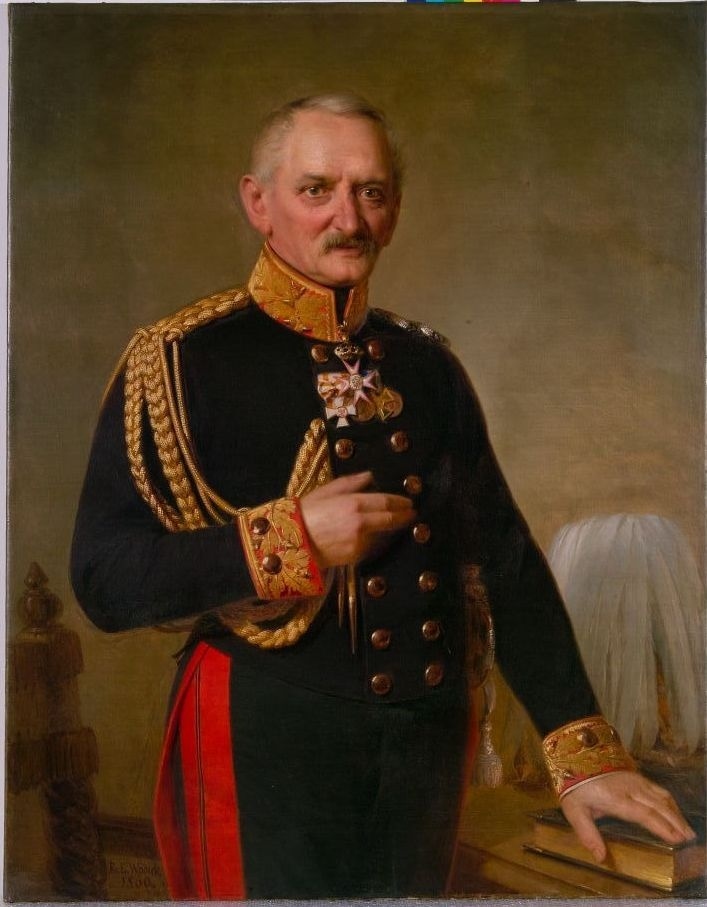 Karl Wilhelm Bonsac (* 16. September 1791 in Aken (Kreis Kalbe); † 9. August 1864 in Magdeburg) war königlich preußischer Generalmajor und zuletzt Kommandeur der 12. Infanterie-Brigade.